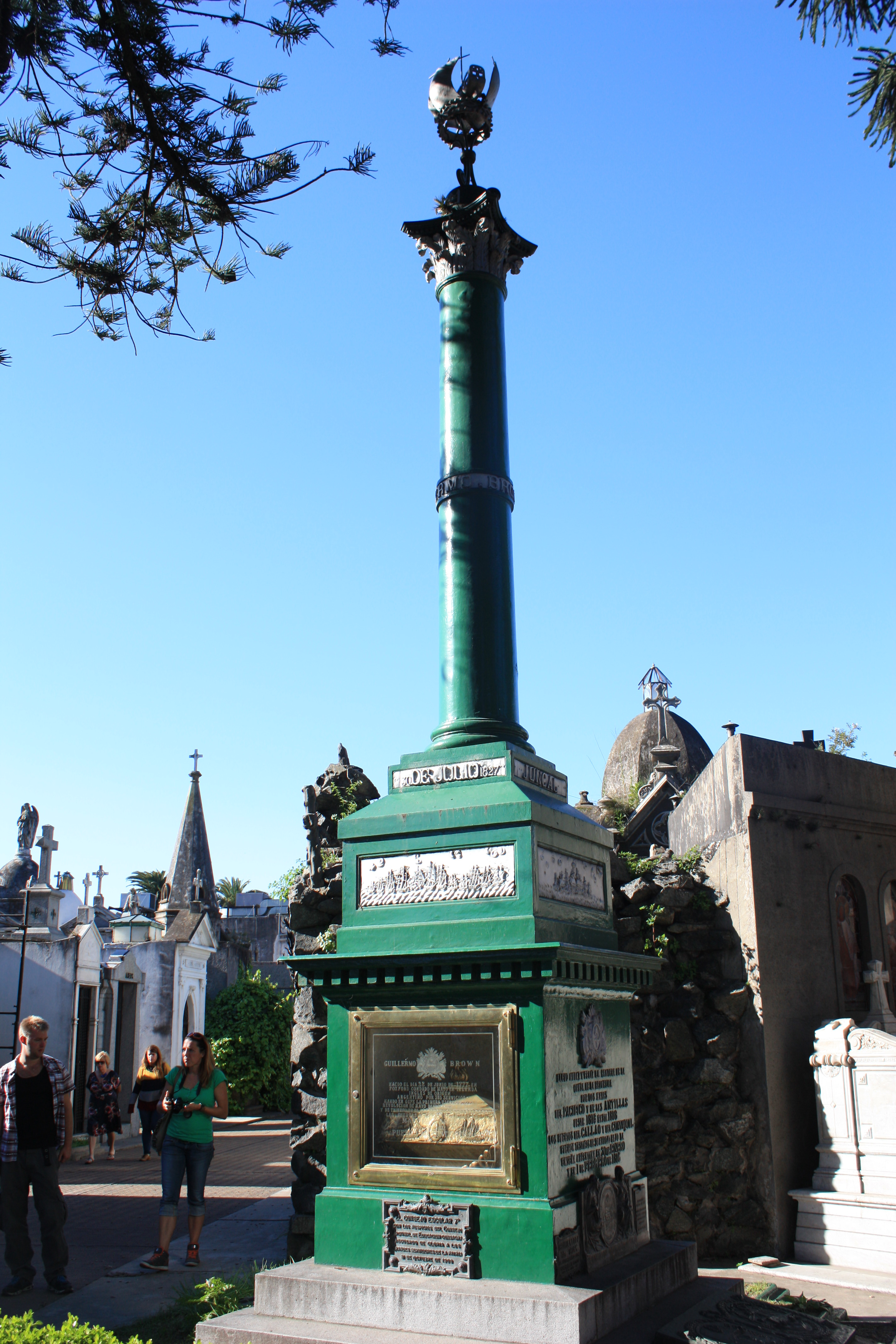 Sepulcro de Guillermo Brown